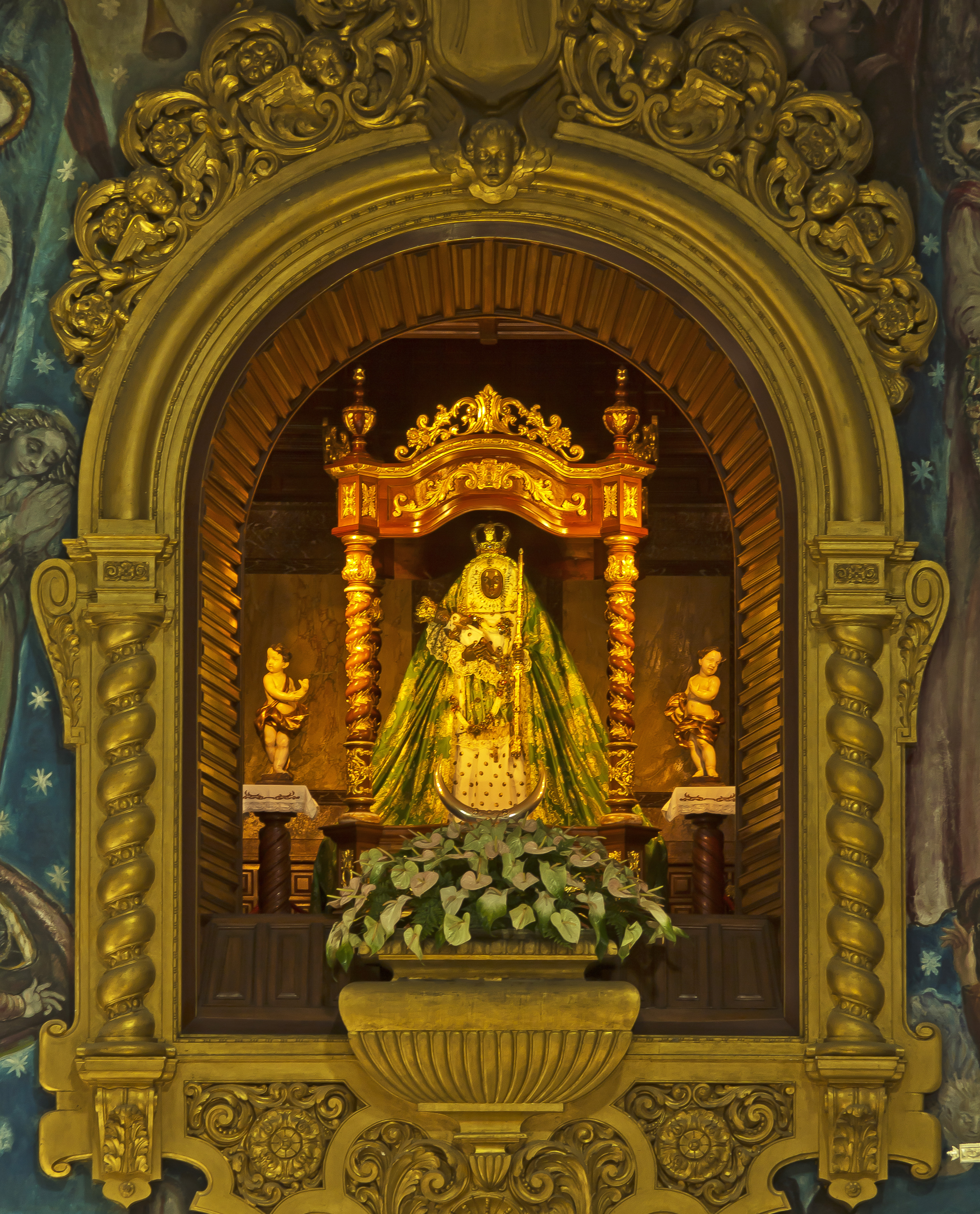 Altarniesche in der Basilika mit der Figur der Jungfrau von Candelaria